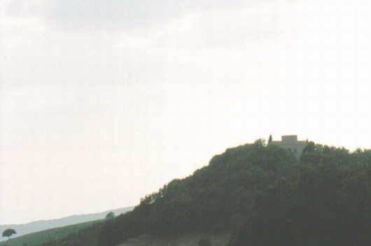 descrizione: veduta del Castello di Scerpena lavoro personale di Vinattieri Matteo che lascia in pubblico dominio il 01/02/2007; foto scattata da apparecchio non digitale nel settembre 2005 e rielaborata successivamente